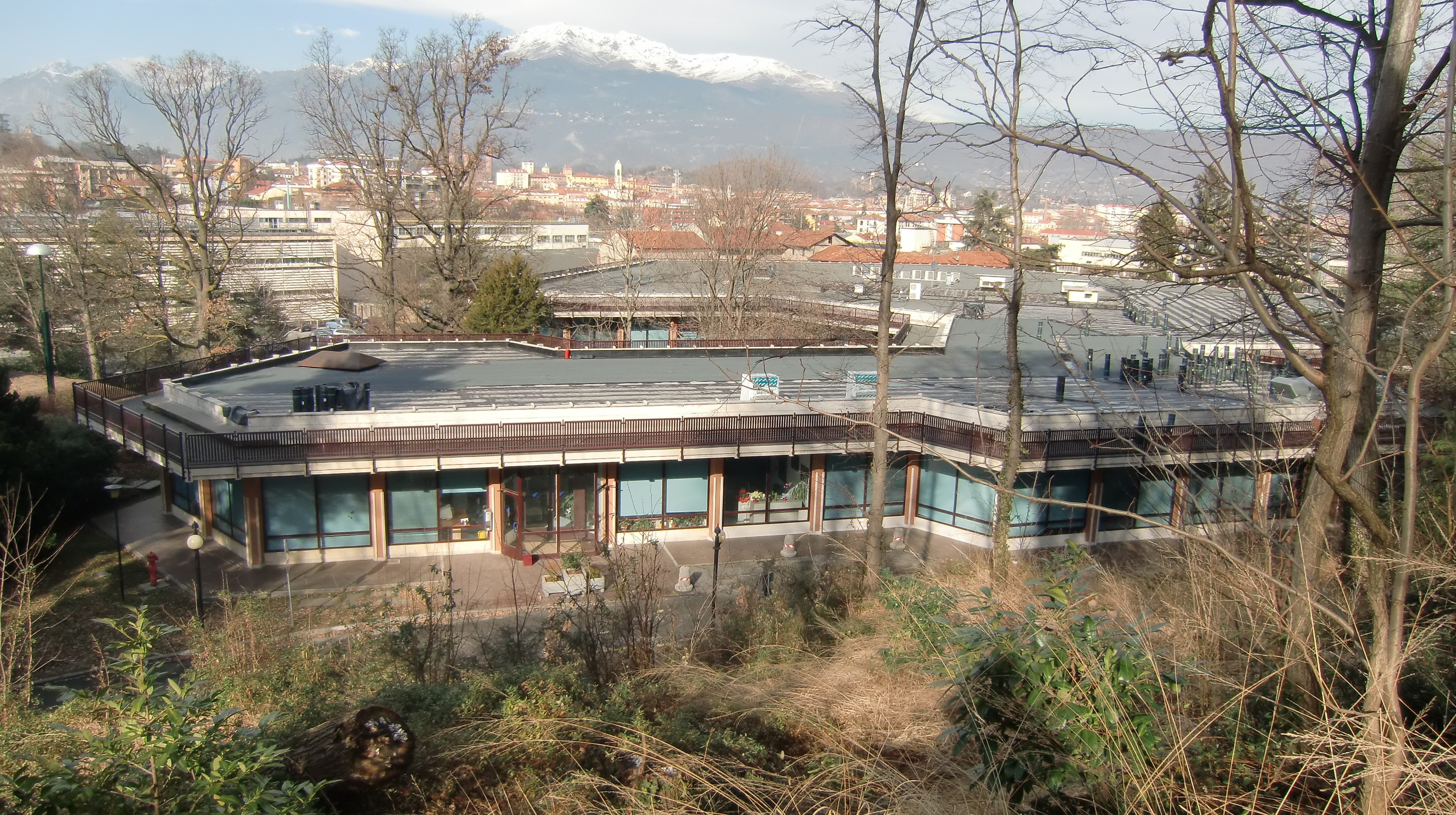 Ivrea, ex Mensa Olivetti progettata da Ignazio Gardella